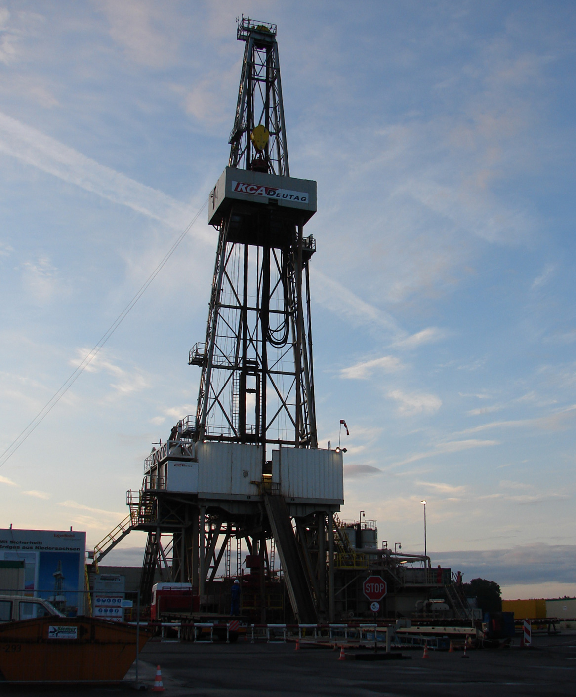 Moderne, schwere Bohranlage in der Nähe von Vechta, Niedersachsen.